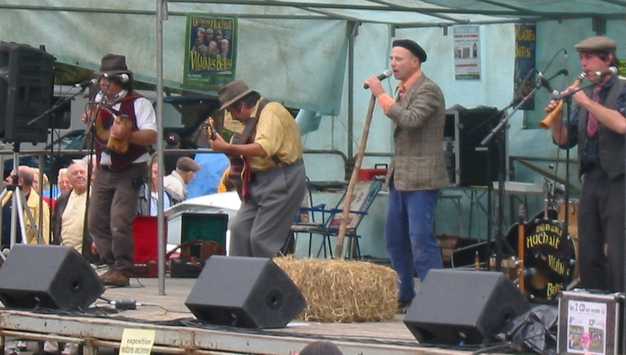 Bébert Huchait et les Vilaïnes Bétes, Mont Dol, 30 dé Septembre 2007